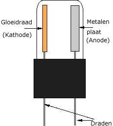 Van Wikipedia.enDaar geupload door Stevan White met beschrijving (Diagram of Vacuum-Tube Diode)